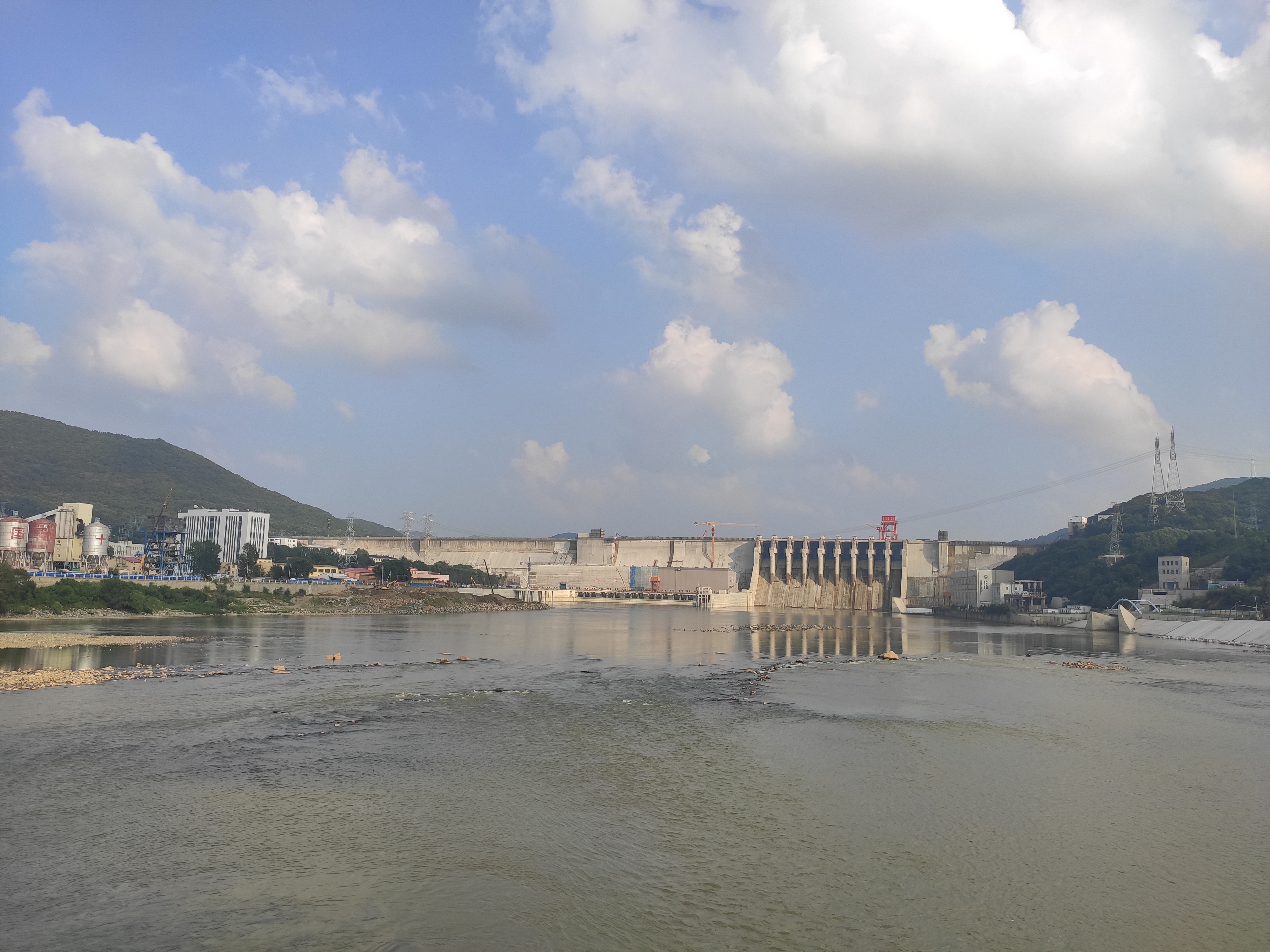 丰满水电站新大坝（2019年7月）